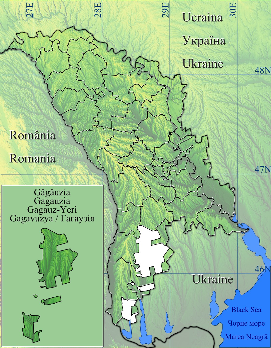 Harta regiunii autonome Gagauzia din Republica Moldova. Harta de localizare calibrata dupa coordonatele geografice: 48.75N / 26.5E, 45.25N / 30.5E